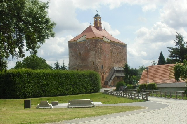 Der Festungsturm ist Teil der ehemaligen Festung Peitz, erbaut Mitte bis Ende des 16. Jahrhunderts, aufgelöst ab 1764. Der Turm ist in die Liste der Baudenkmale in Peitz eingetragen.